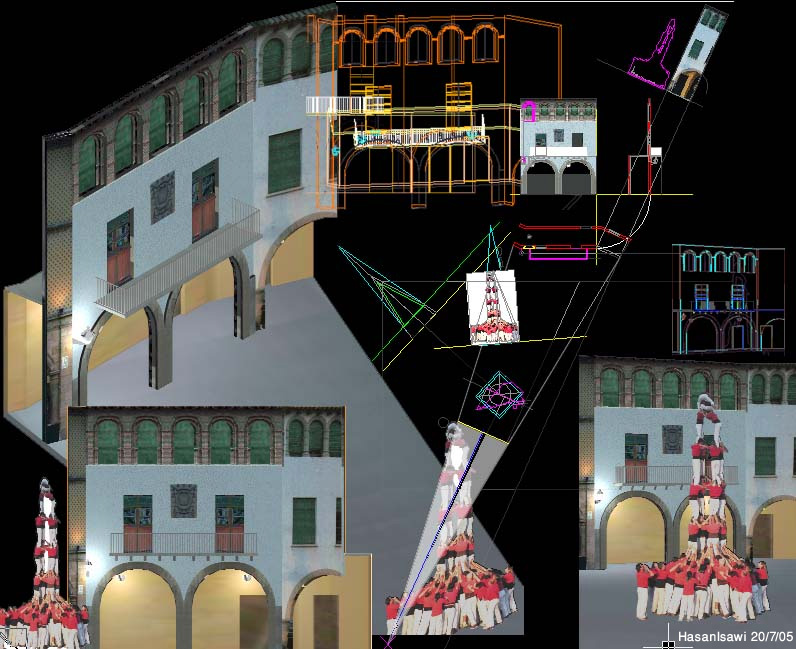 L'applicazione informatica della restituzione prospettica, viene finalizzata a riprodurre con l'ausilio di fotografie, dei modelli tridimensionali come copie, soprattutto, virtuali di manufatti architettonici reali.